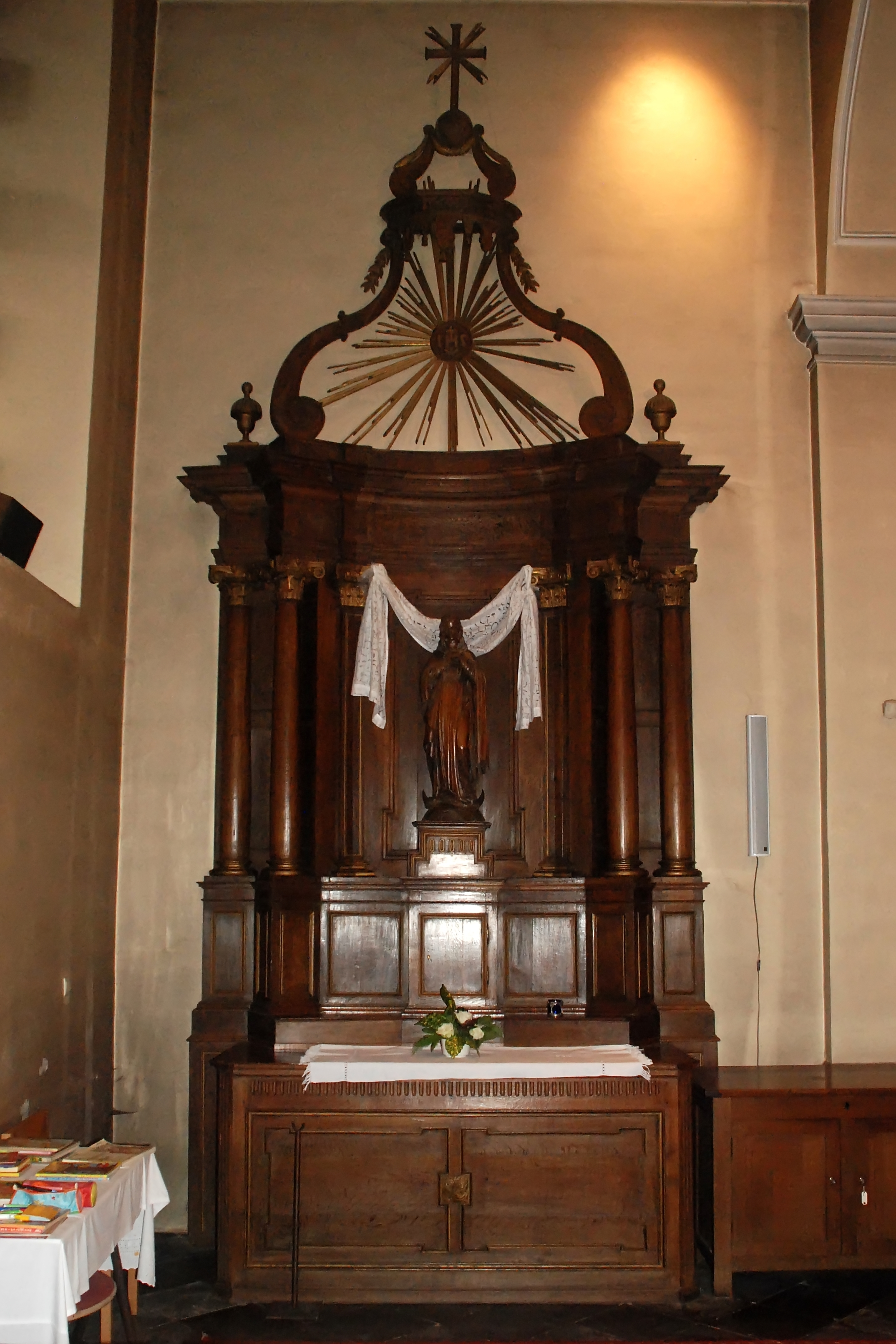 Belgique - Brabant wallon - Ottignies - Église Saint-Rémi